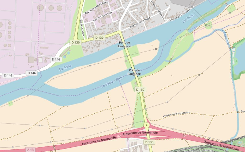 Carte de l'île de Rangiport (Yvelines, France)